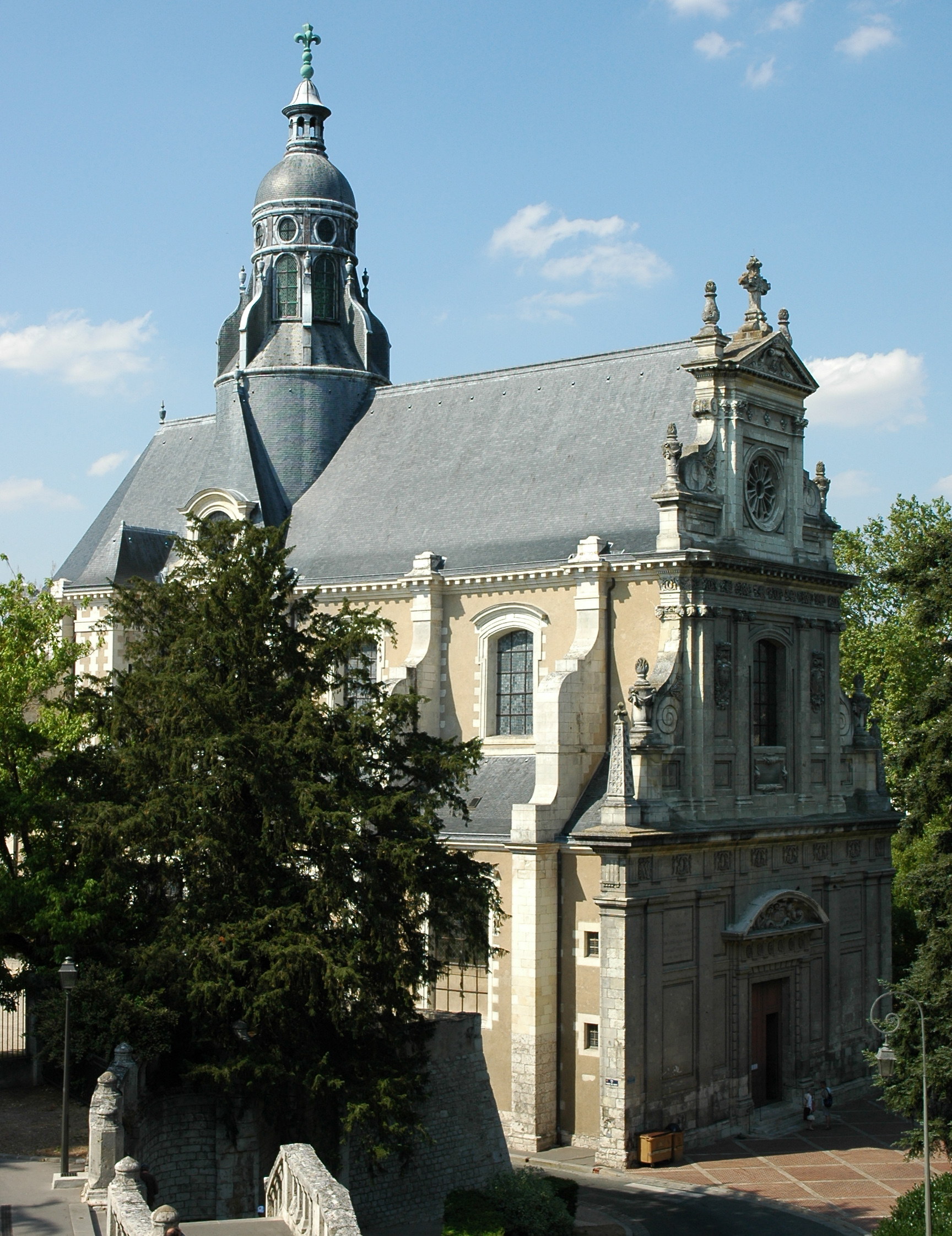 France Loir-et-Cher Blois Eglise Saint-Vincent Photographie prise par Patrick GIRAUD